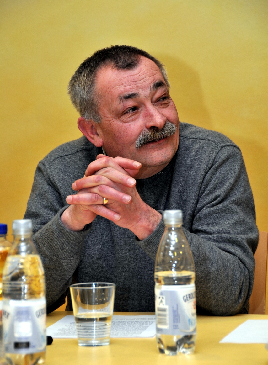 Das Bild zeigt den deutsch-rumänischen Schriftsteller Uwe Erwin Engelmann bei einer Lesung des Dichterstammtisches Siegen in den Räumen der Siegener Waldorfschule am 20. März 2009.